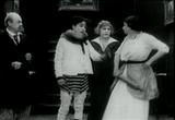 Escena de la película de Charles Chaplin A Woman